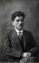 Пашалидис, Иван Георгиевич